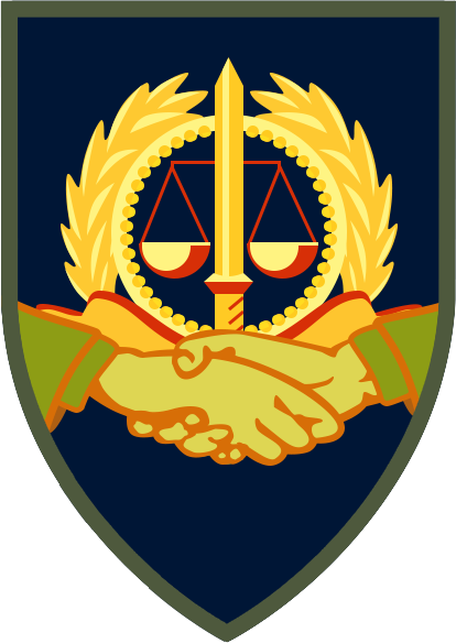 תג סניגוריה צבאית.